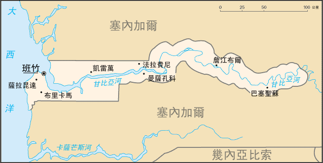 甘比亞共和國地圖。